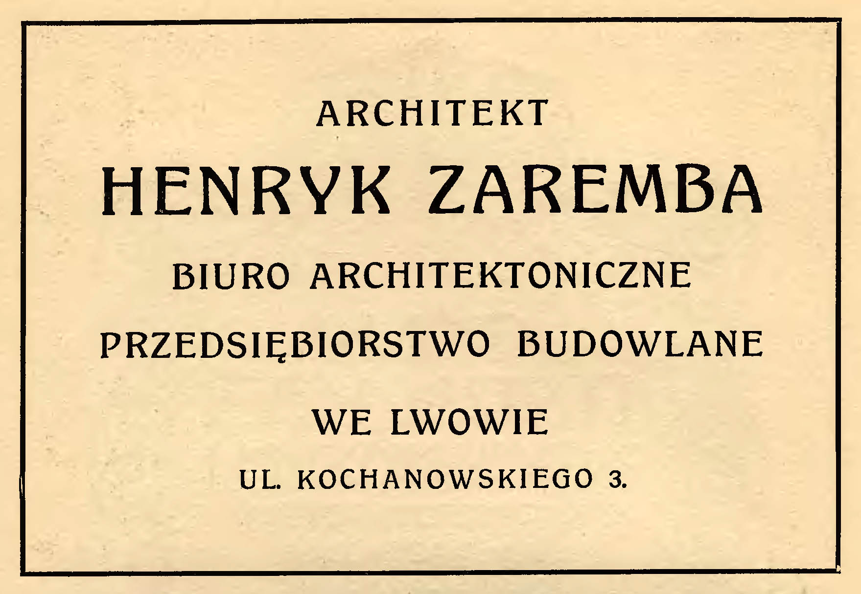 Реклама архітектора Генрика Заремби у часописі Rocznik Architektoniczny 1913/1914.